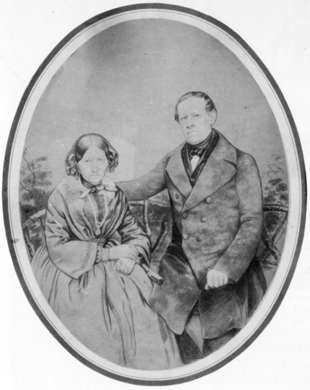 Eduard Eyth (1809–1884) und seine Gattin Julie Capoll (1816-1904)